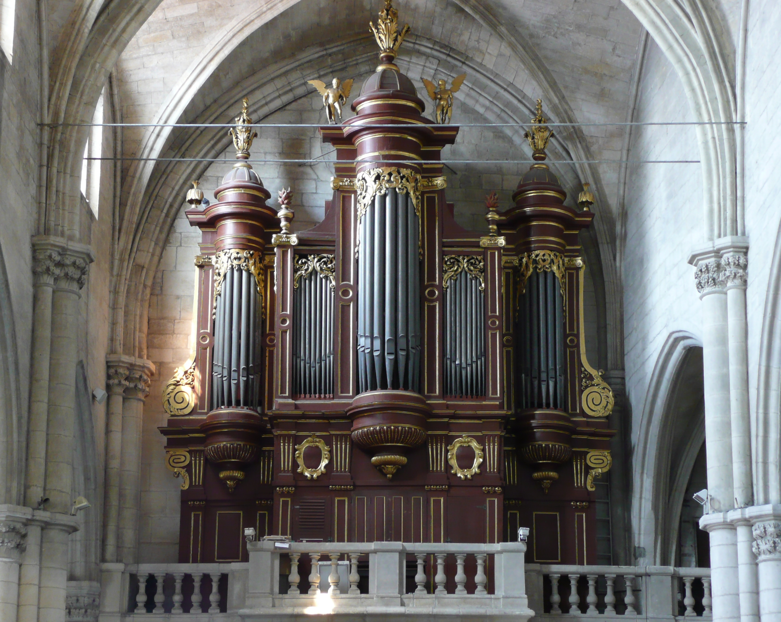 C'est le seul buffet peint et doré de Charles Boisselin parvenu jusqu'à nous, les autres étant tous en bois teinté naturel.Il a donc ajouté les deux tourelles latérales.